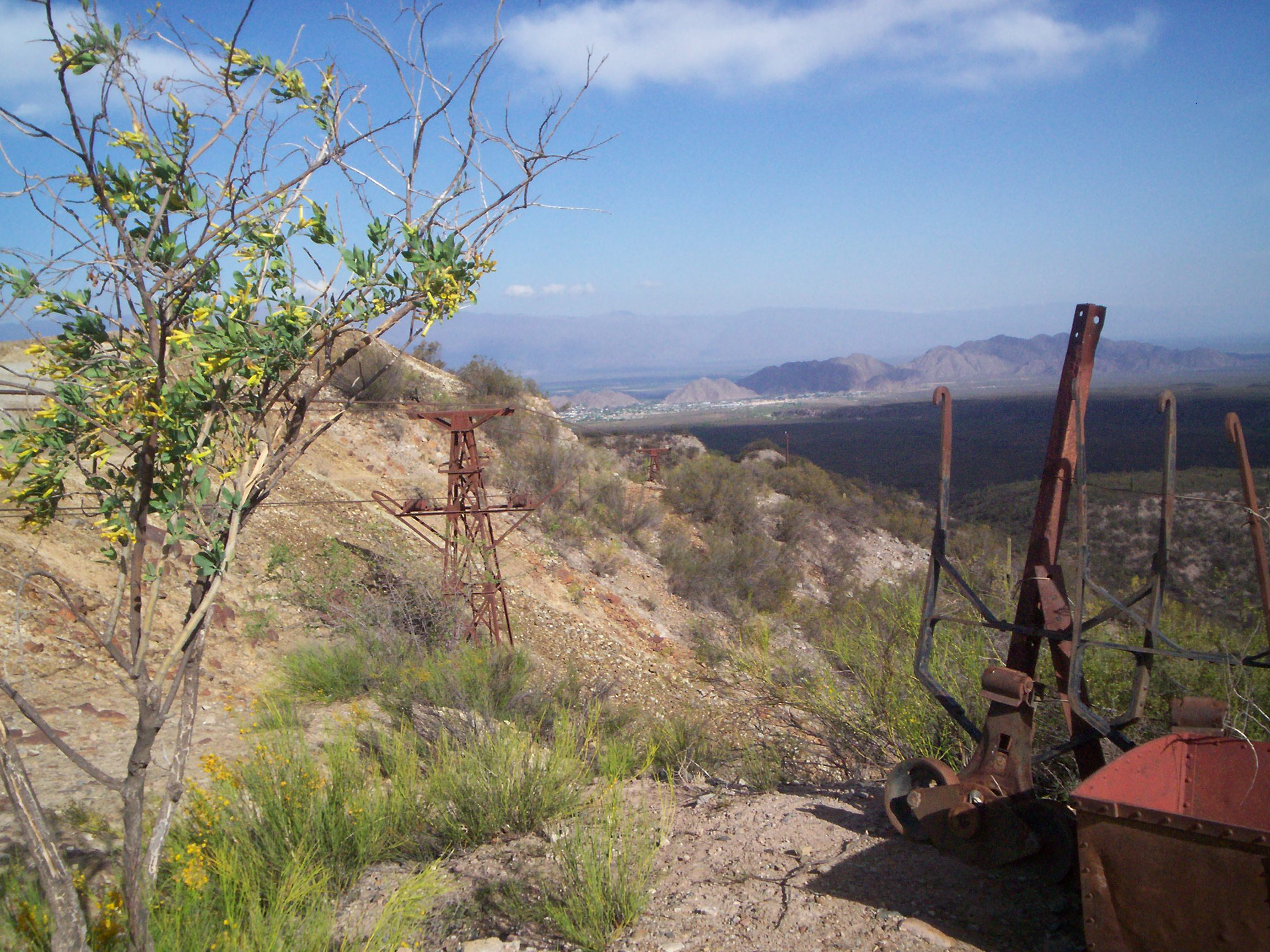 Cablecarril minero (Mina La Mejicana, Chilecito, Argentina) - Estación II, salida hacia Chilecito - Al fondo, vista de la ciudad.